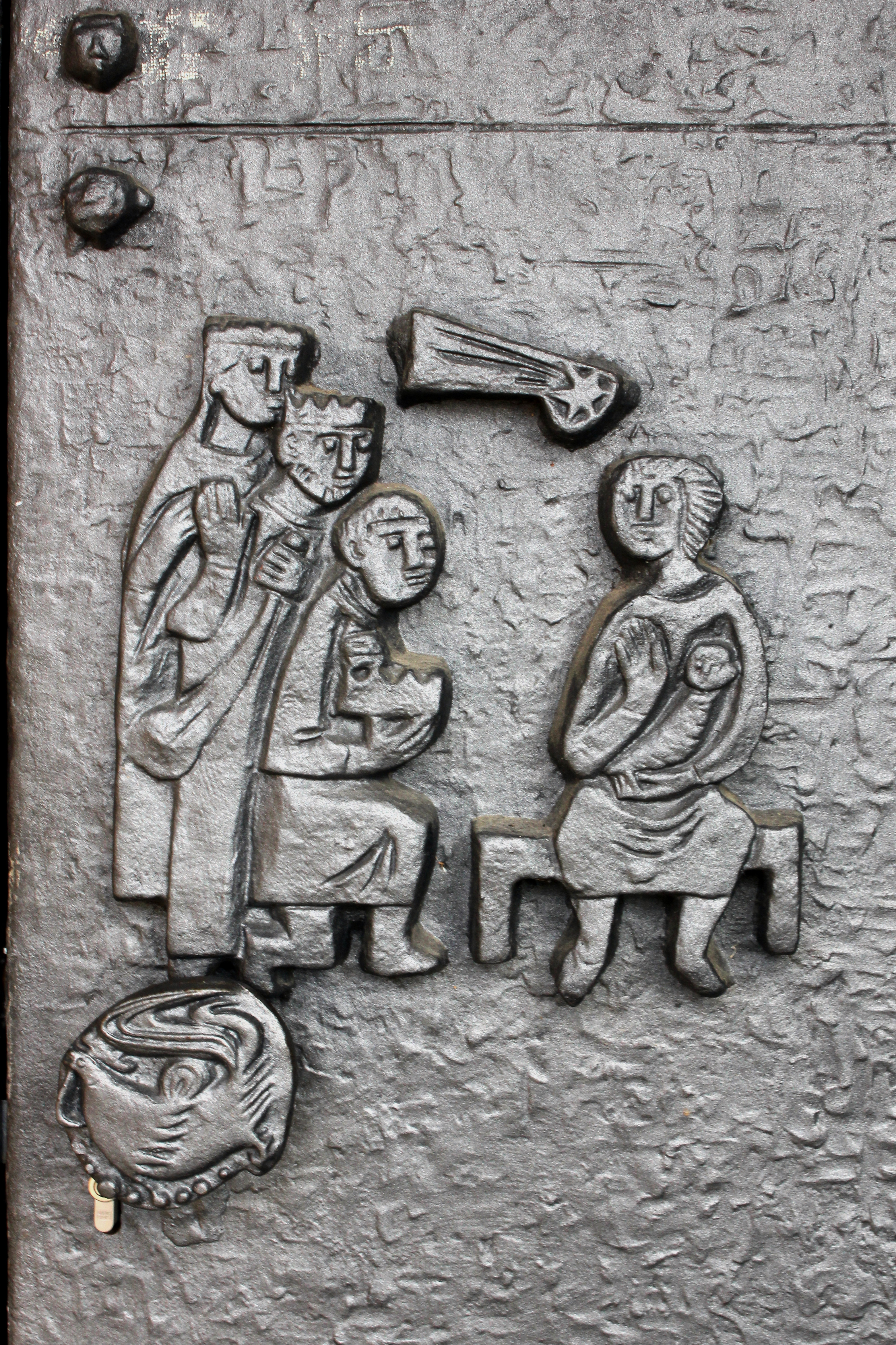 Heilige drei Könige; Relief von Egino Weinert (1920–2012) am Portal der Pfarrkirche von Bad Bodendorf (um 1970)